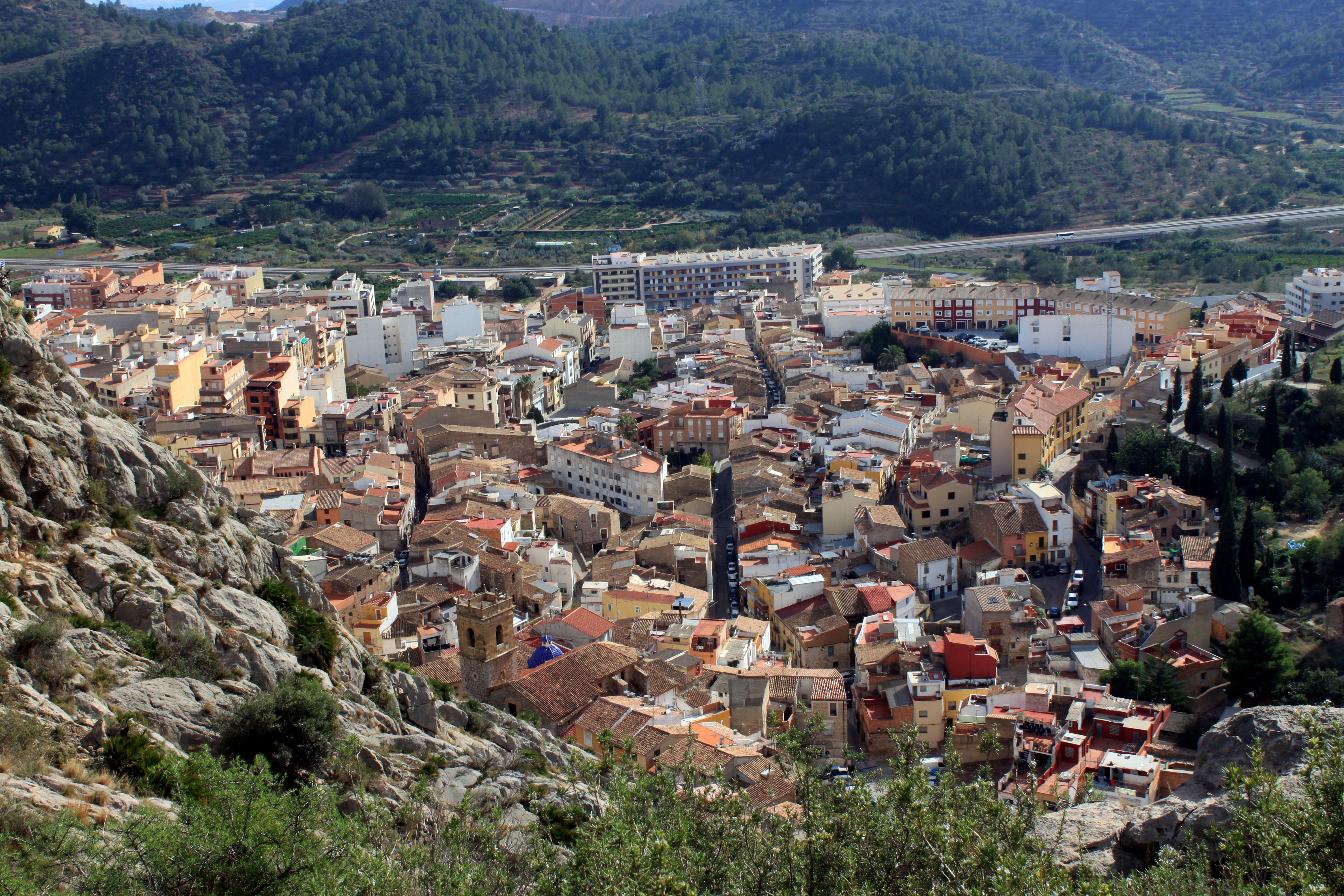 Vista de la localidad de Borriol desde las inmediaciones del castillo. Borriol, provincia de Castellón, Comunidad Valenciana, España.